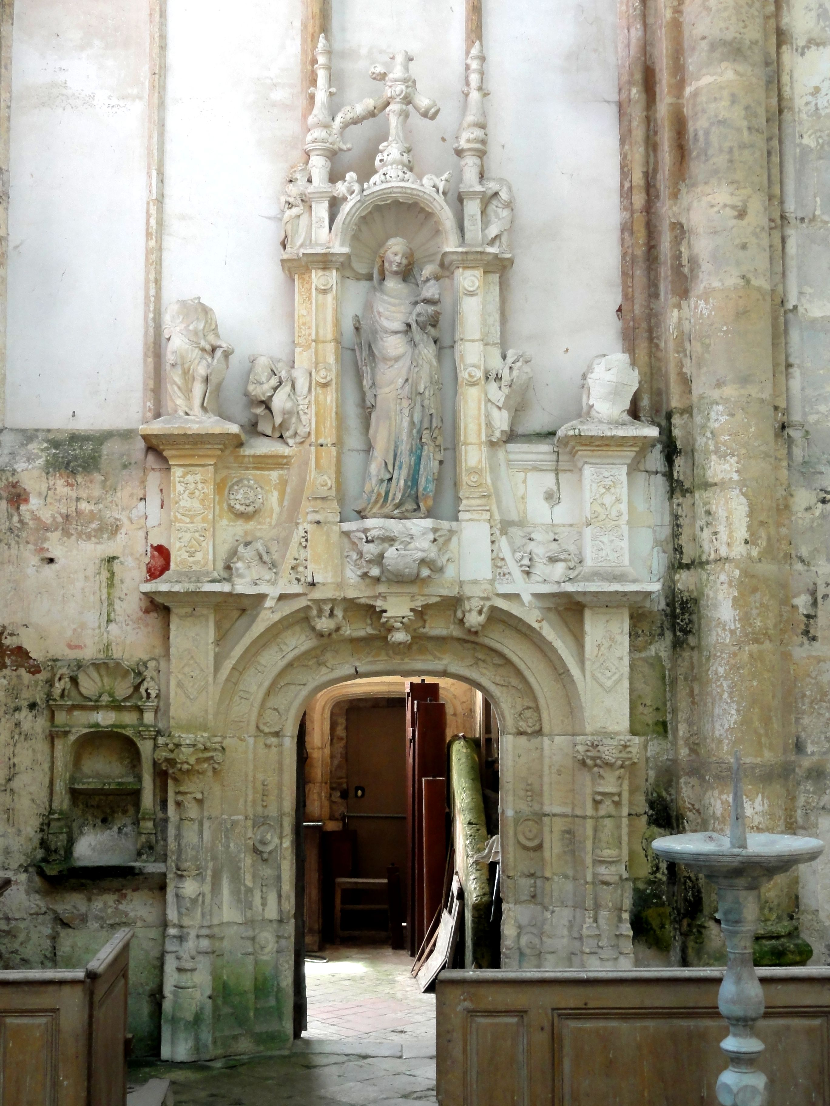 Décor flamboyant de la porte de la sacristie.